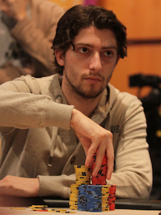 Igor Kurganow beim Super High Roller der Aussie Millions Poker Championship 2013